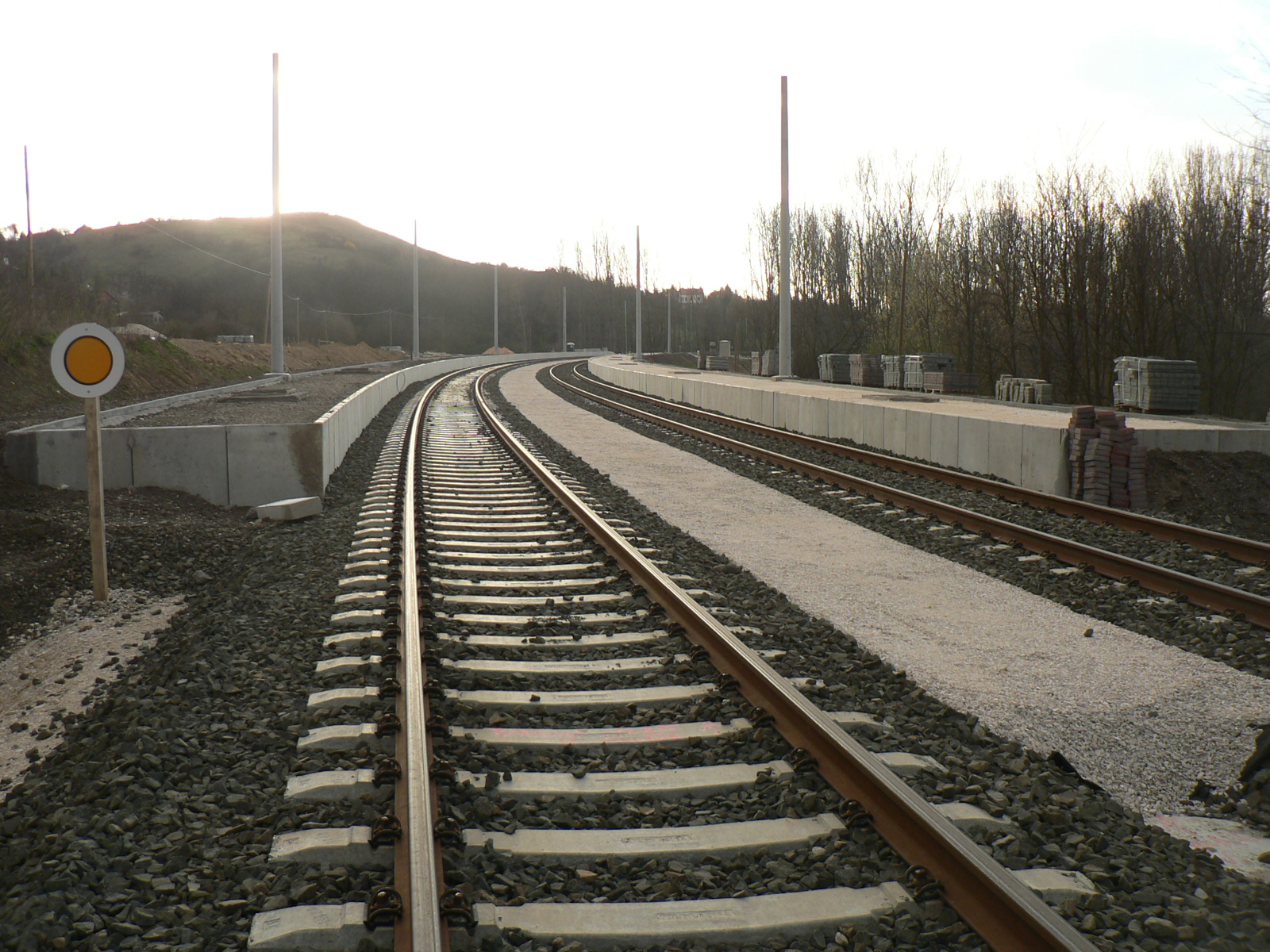 A Szél-hegy a róla elnevezett vasúti megállóhellyel, naplementében